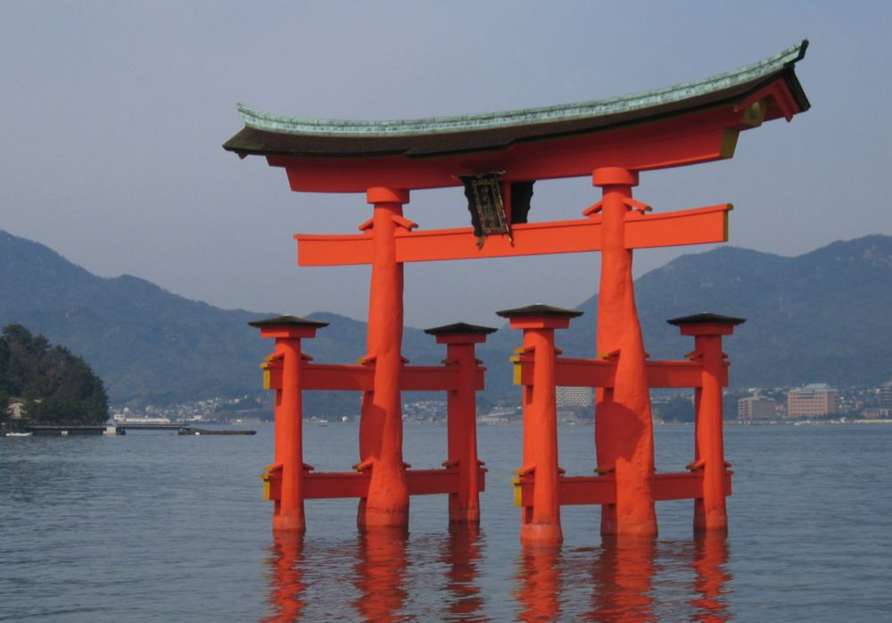 Floating torii at Itsukushima Shrine on Miyajima Island, Japan.